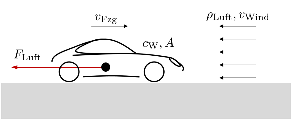 Prinzipskizze zum Luftwiderstand an Fahrzeugen